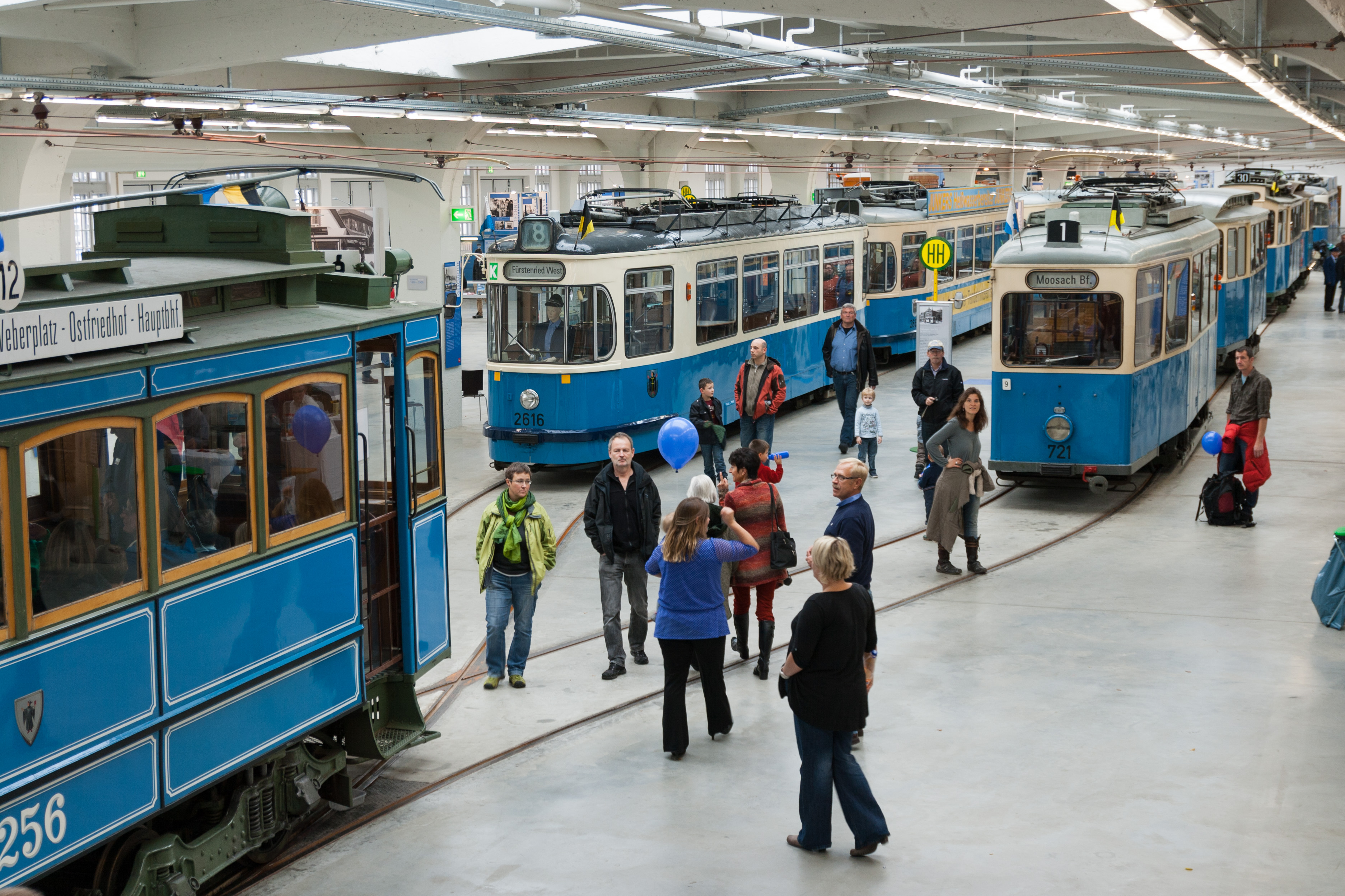 MVG Museum